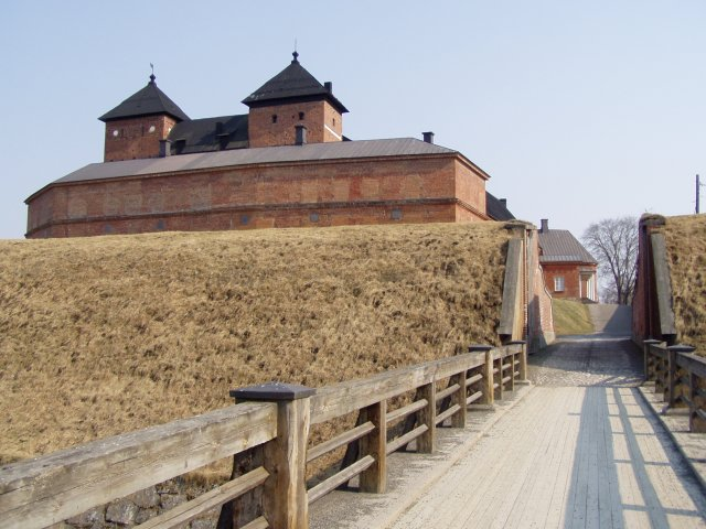 Castle Of Häme in Finland